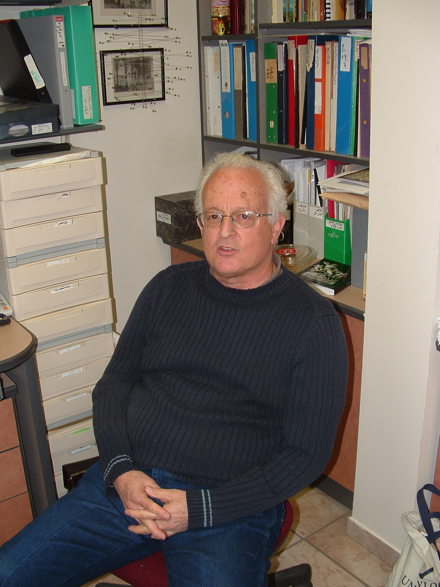 Professor Ronny Reich - Archaeologist from Haifa University, Israel פרופסור רוני רייך, ארכאולוג בחוג לארכאולוגיה באוניברסיטת חיפה